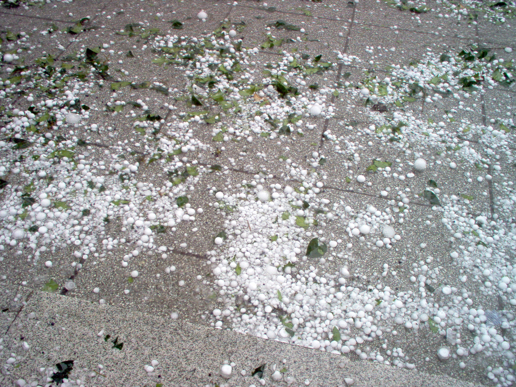 Temporal de granizo que se manifestó en la Ciudad Autónoma de Buenos Aires el 26 de julio de 2006